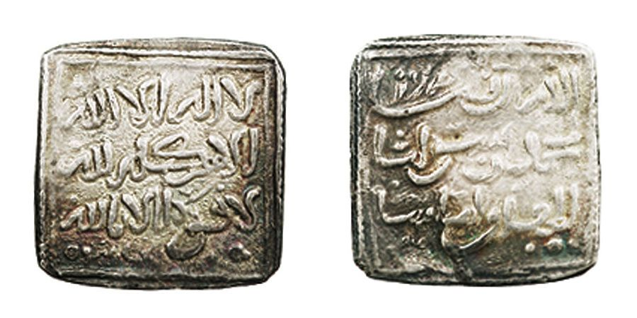 Dírham almohade anònim, emès a Tilimsen. En plata